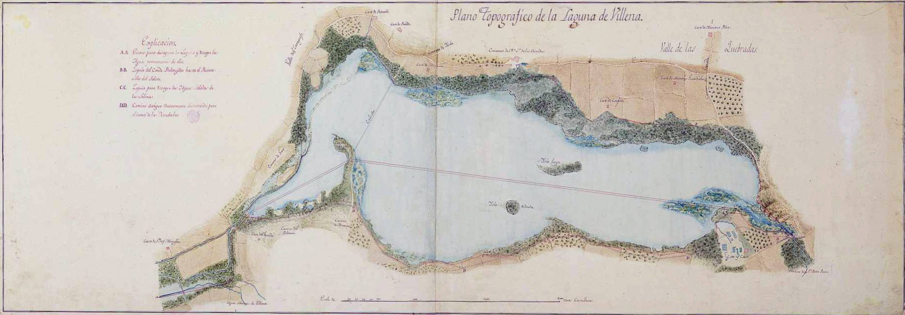 Plano de la Laguna de Villena.